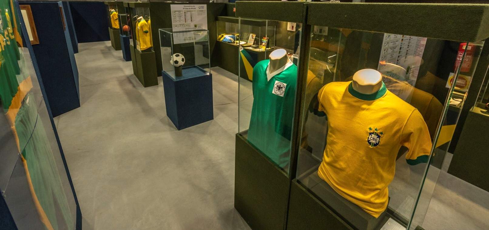 Vista parcial do corredor das Copas de 1966, 1970 e 1974 no Museu da História do Futebol.